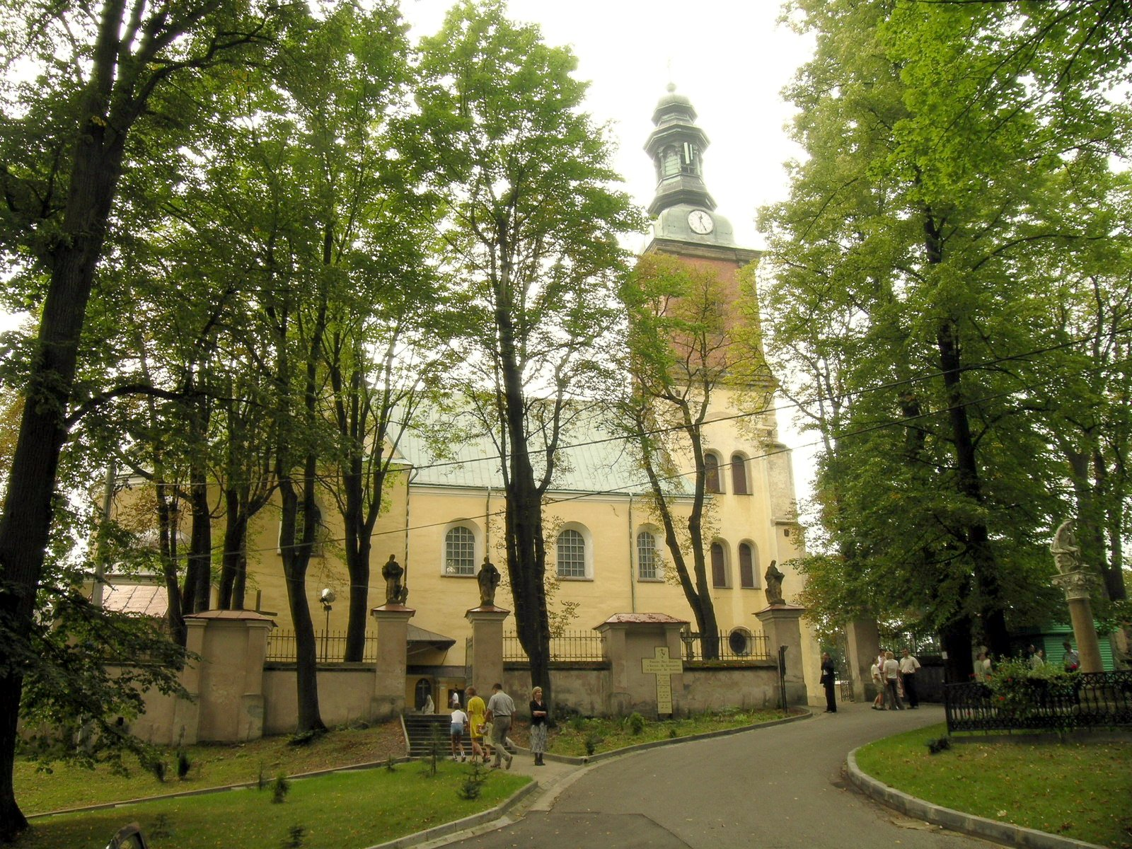 Klasztor bernardynów z kościołem pw. Stygmatów św. Franciszka w Alwernii z 1616 r. Zdjęcie: Mariusz Kędzierski - 11.09.2005